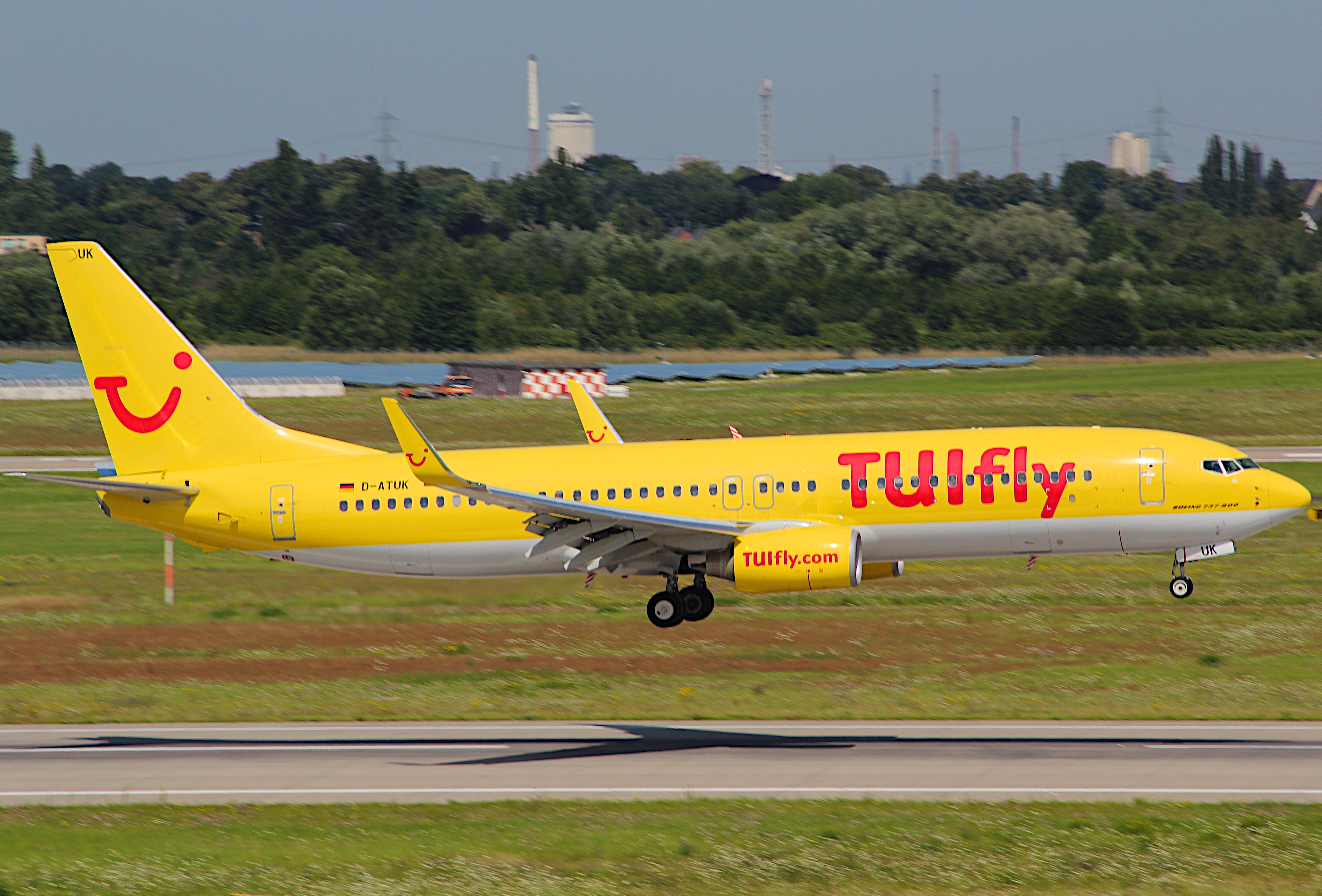 TUIfly landet in Düsseldorf.